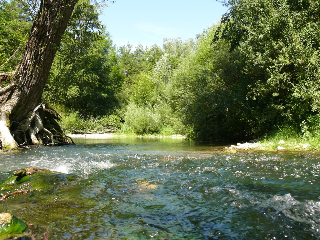 L'Artuby près de La Martre (06)